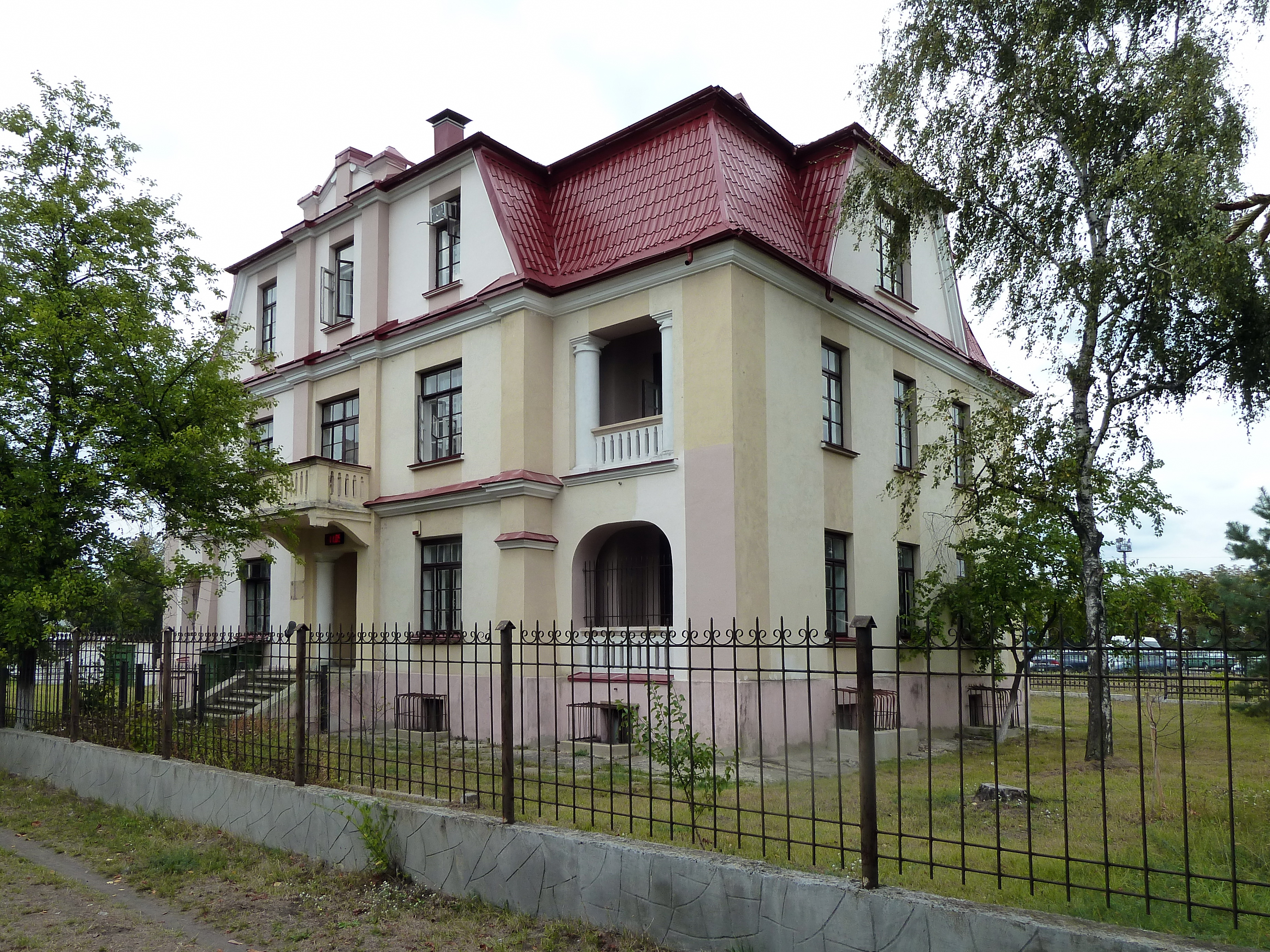 Споруда (мур.) (1920 рік) - Ковель (вул. Ветеранів, 1) Волинська область Україна